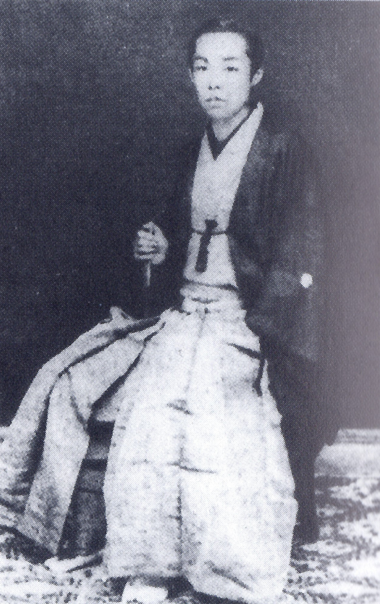 大沢基寿の肖像。